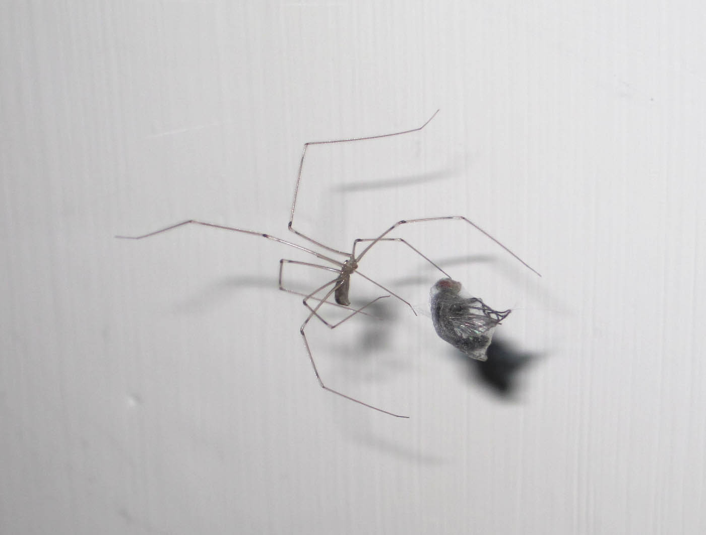 Araña de la familia Pholcidae junto a una presa. Toma hecha en San Román de la Cuba (Palencia, España).